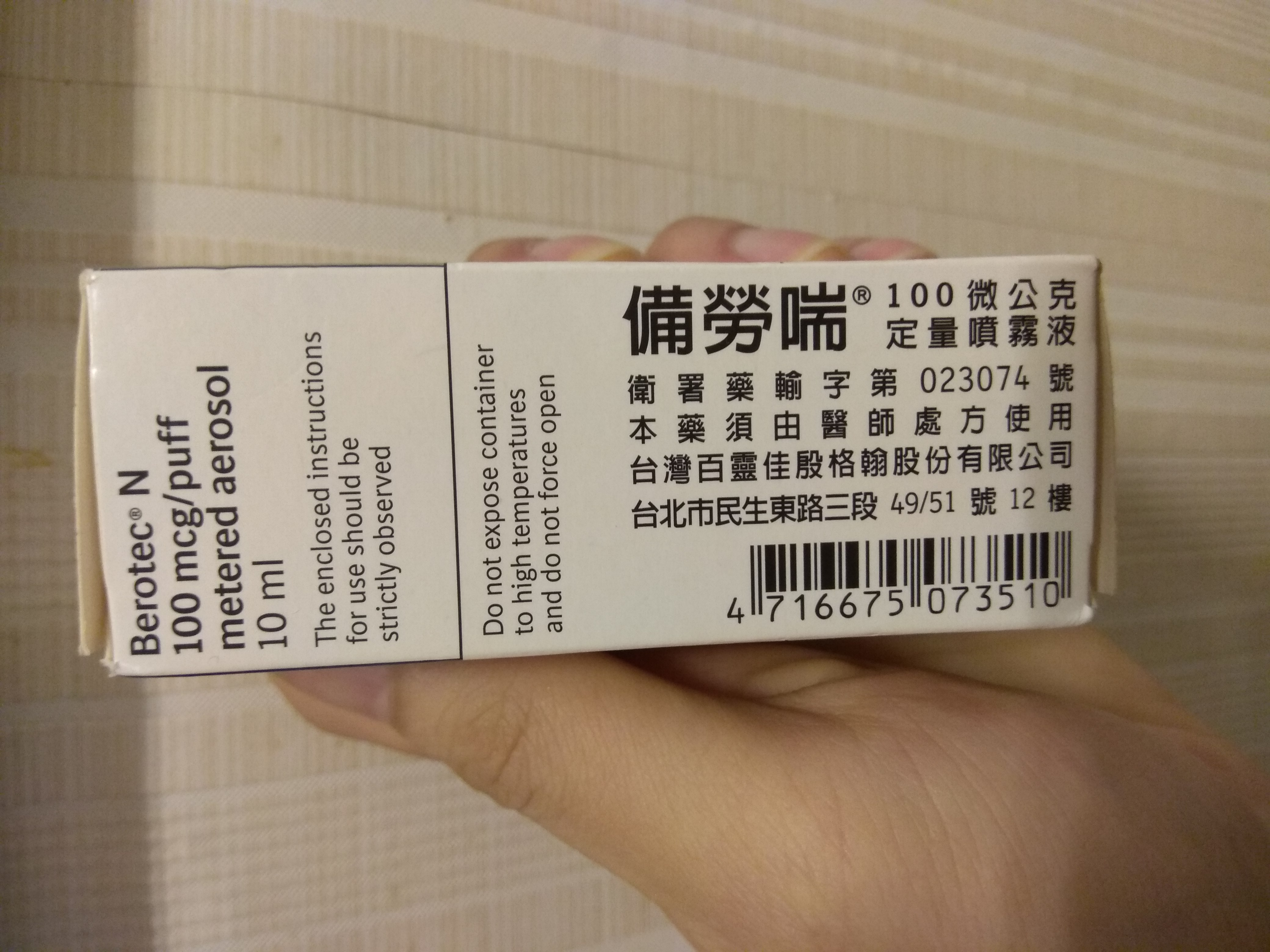 Asthma inhaler